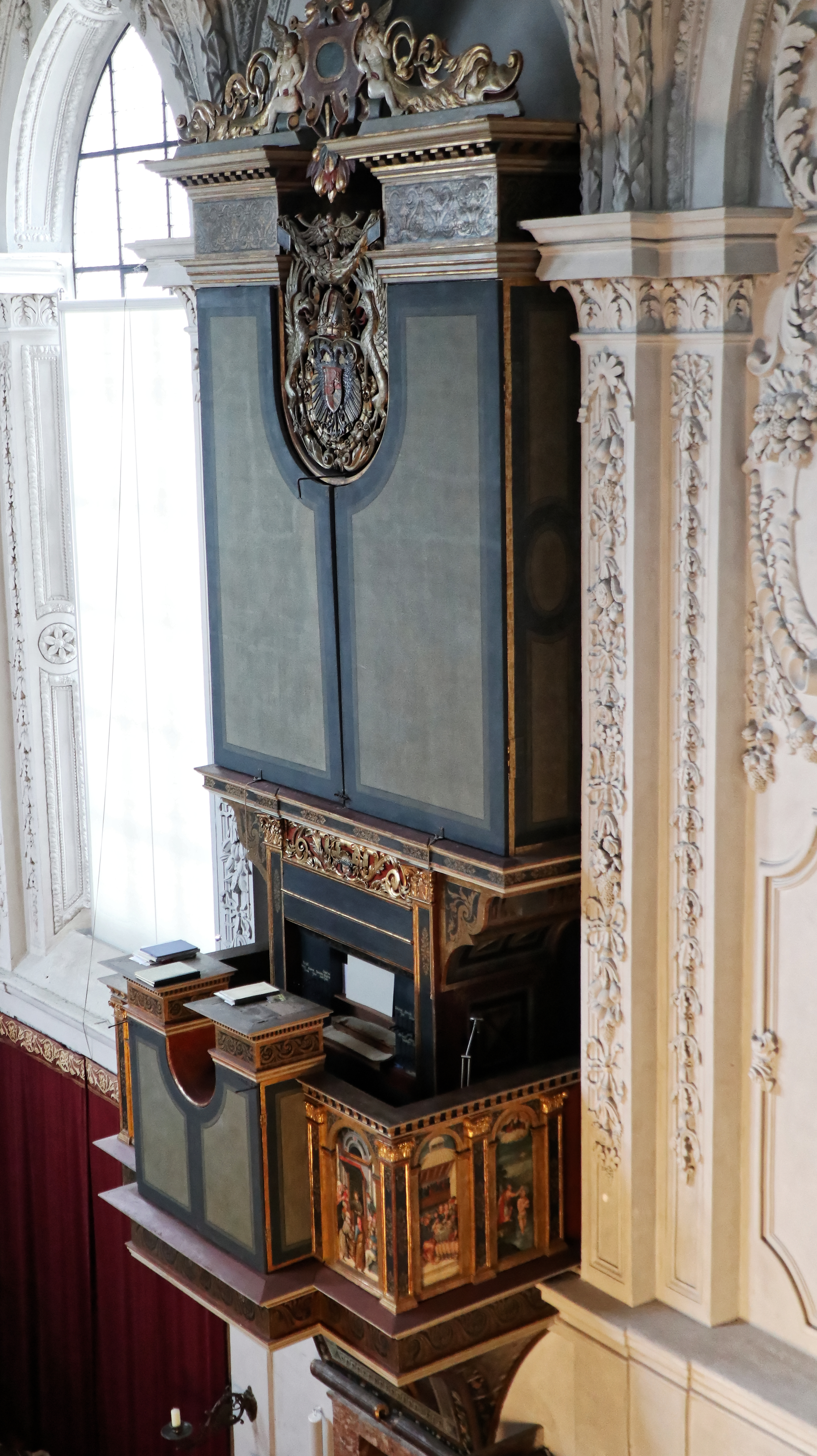 Ebertororgel von oben aufgenommen